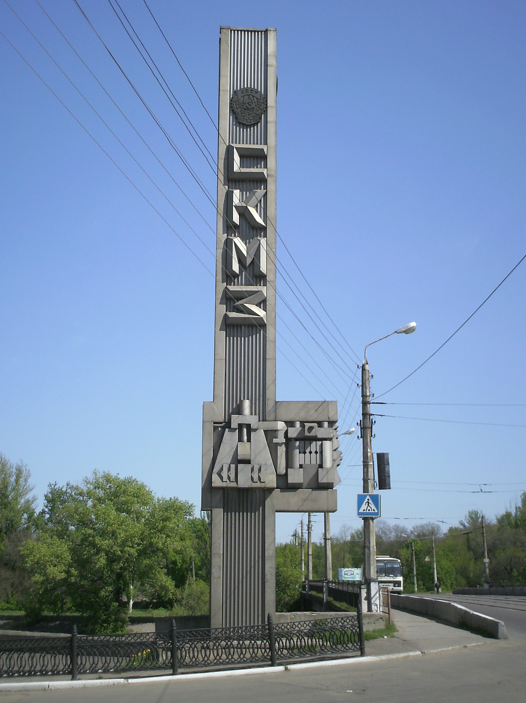 Краматорск